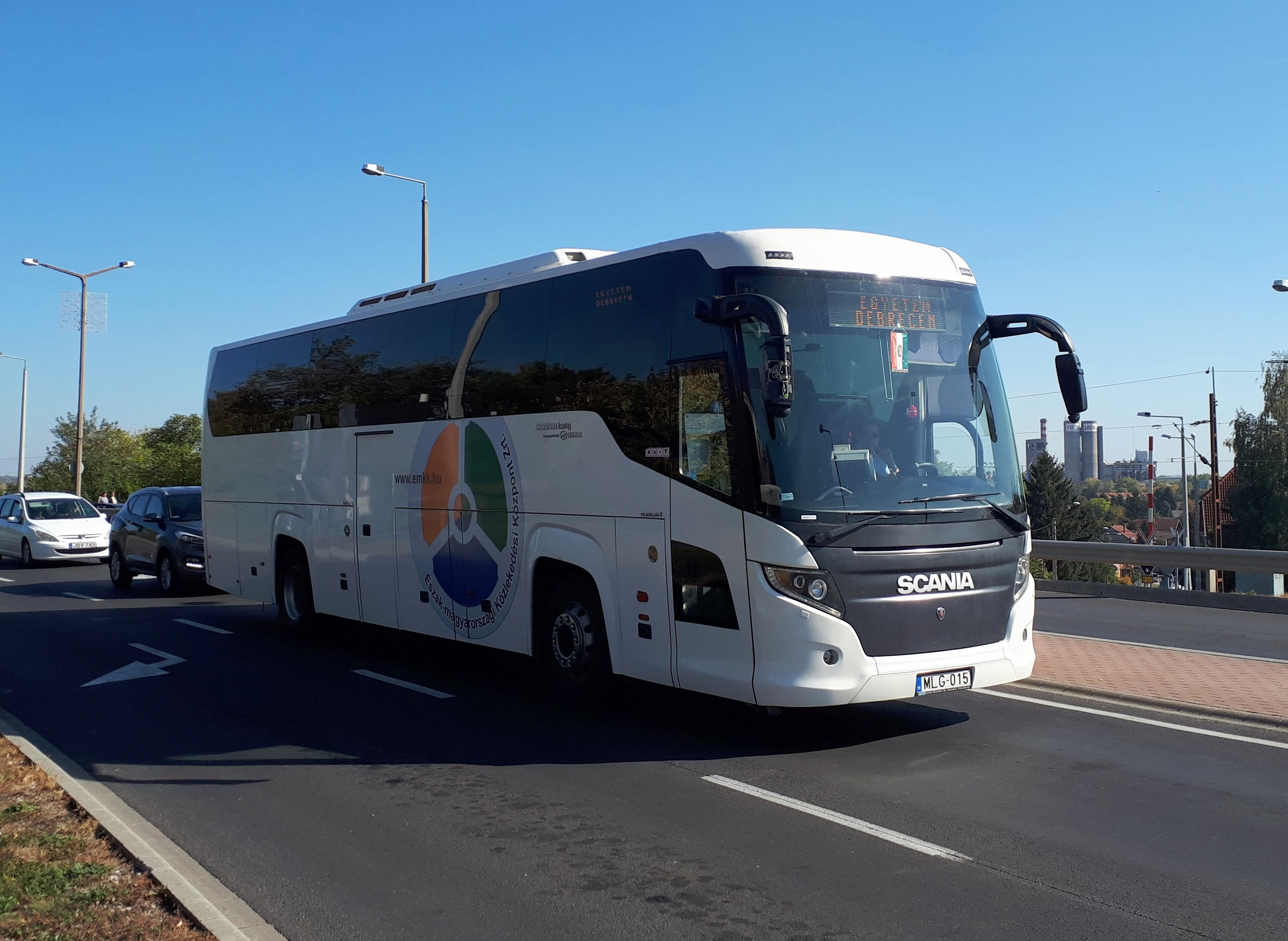 Az ÉMKK MLG-015 rendszámú Scania Higer A80T busza Miskolcon, a 1372-es távolsági járaton.